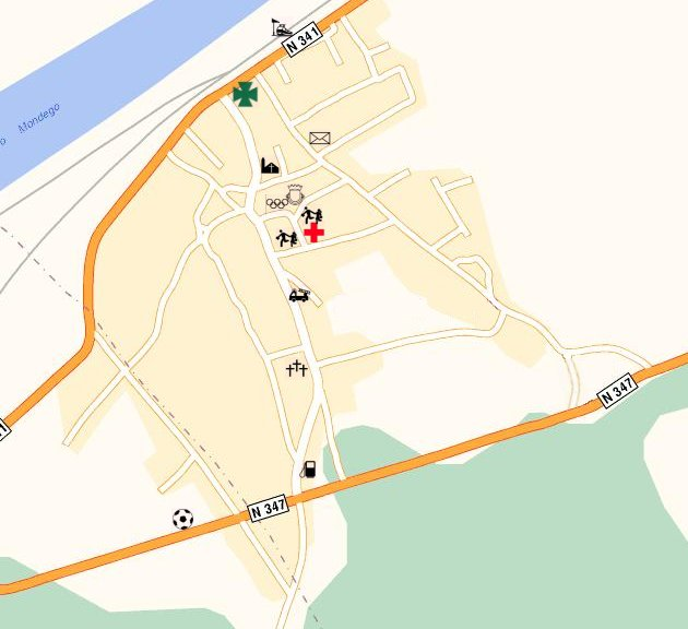 Mapa informativo da Granja do Ulmeiro